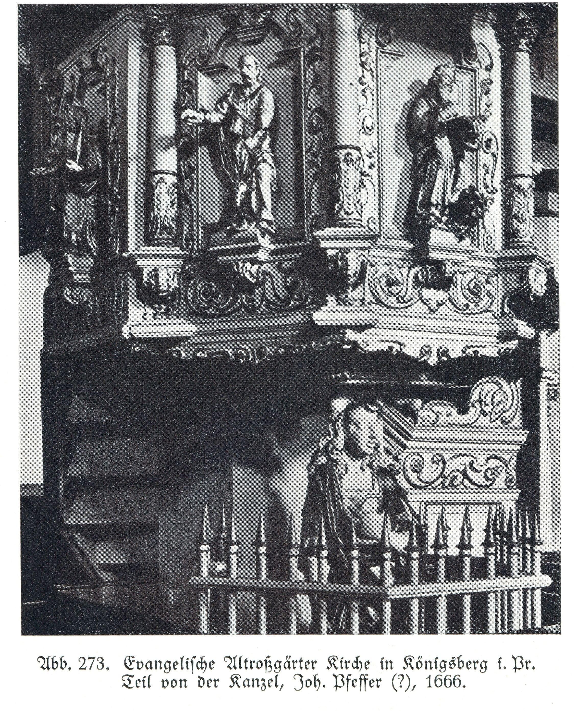 Königsberg, Evangelische Altroßgärter Kirche, Kanzel Joh. Pfeffer (?), 1666